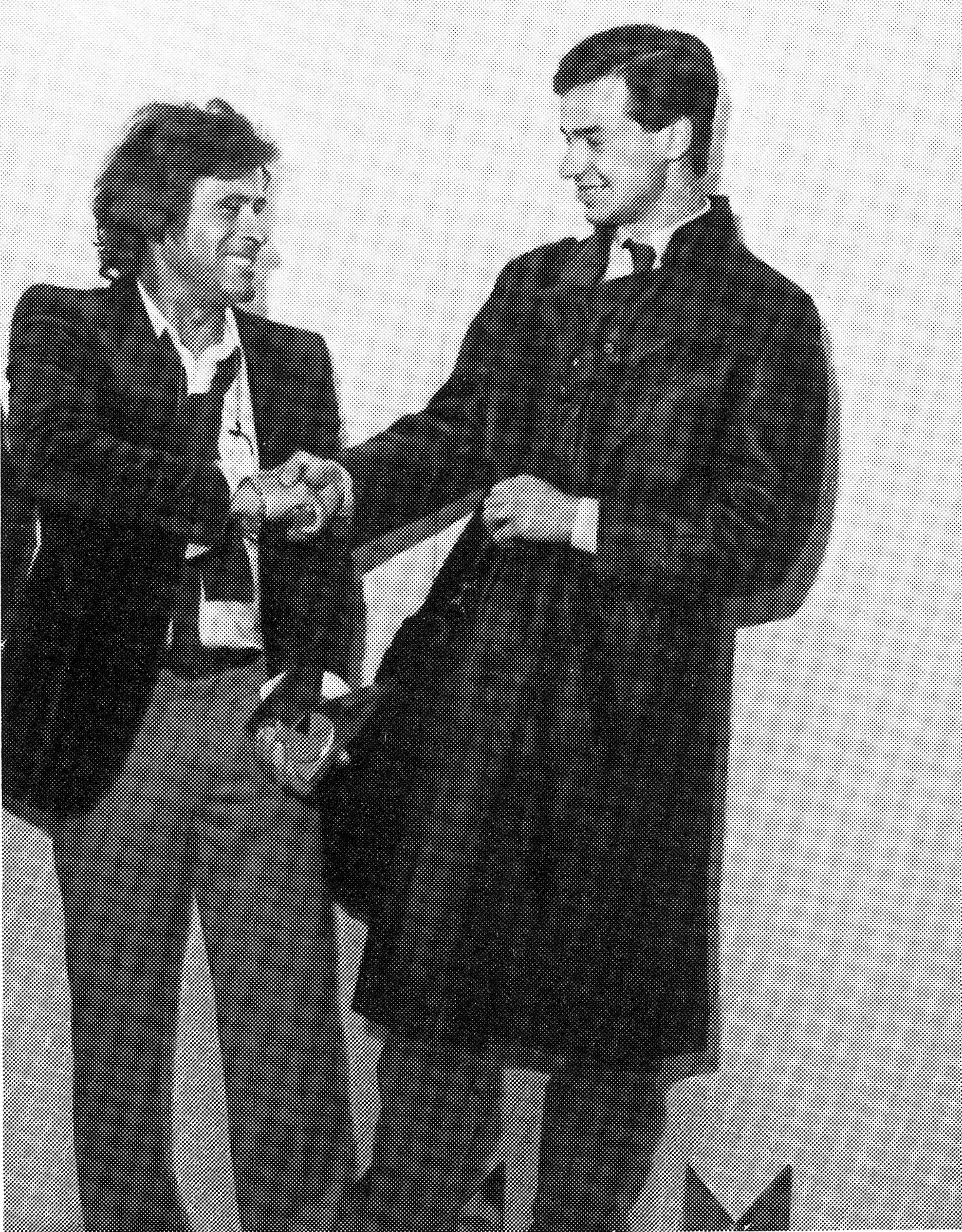 Modellwettbewerb des Kürschnerhandwerks 1981, Preisverleihung. Schwarzer, nappabeschichteter Persianer-Herrenmantel mit passendem Reisesack. links: Clemens Grosse-Segerath, Oberhausen rechts: Kunze jr., Mannheim